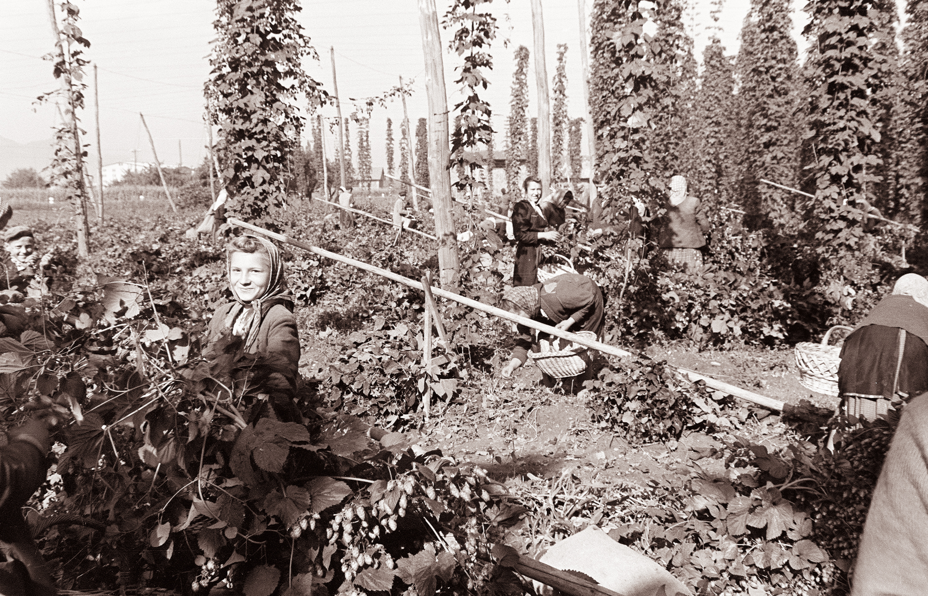 Obiranje hmelja v Savinjski dolini